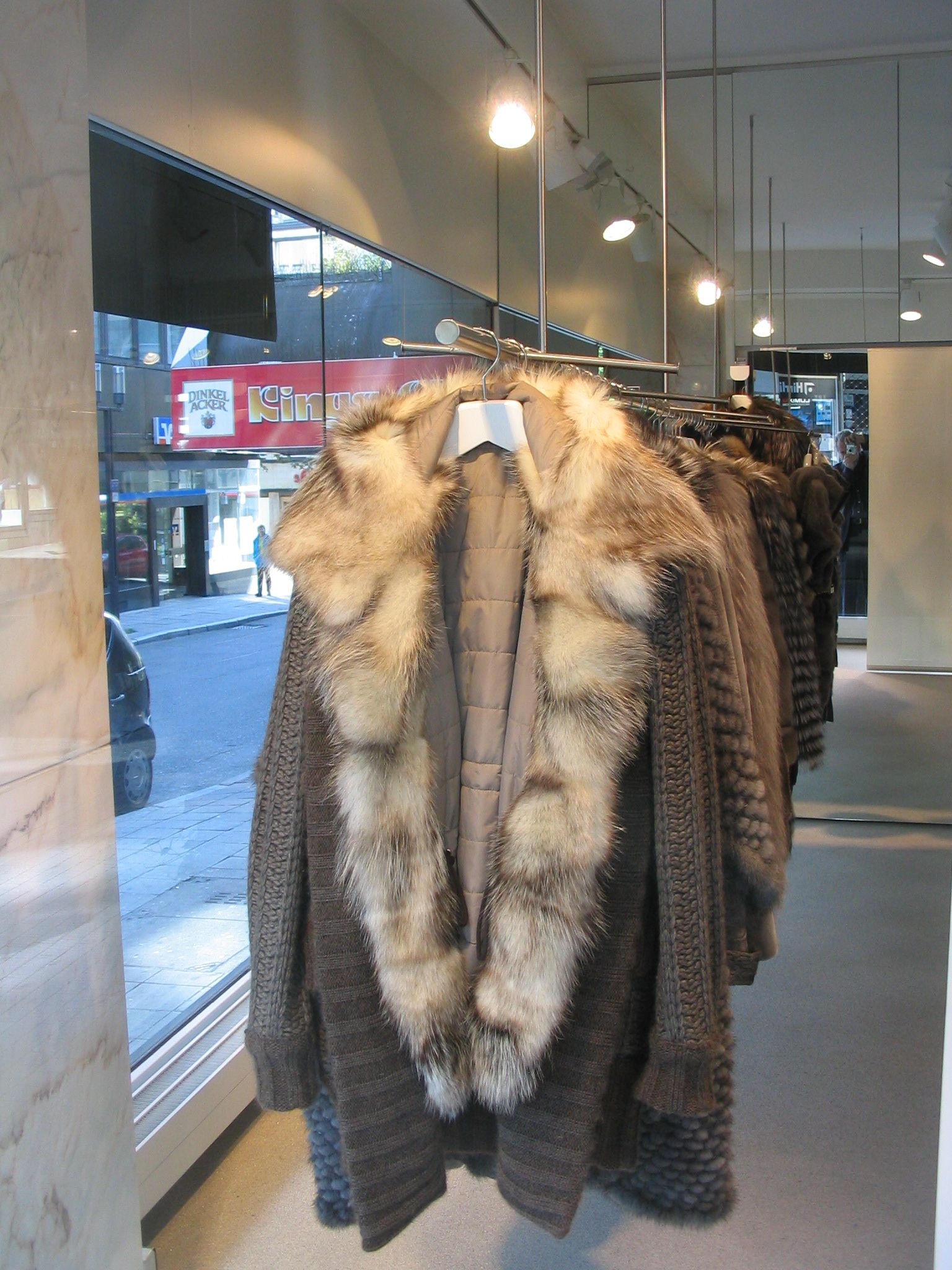 Strickjacke mit Besatz aus Amerikanisch Opossum. gesehen bei: JL Fur Style, Jochen Leutner Pelze, Stuttgart